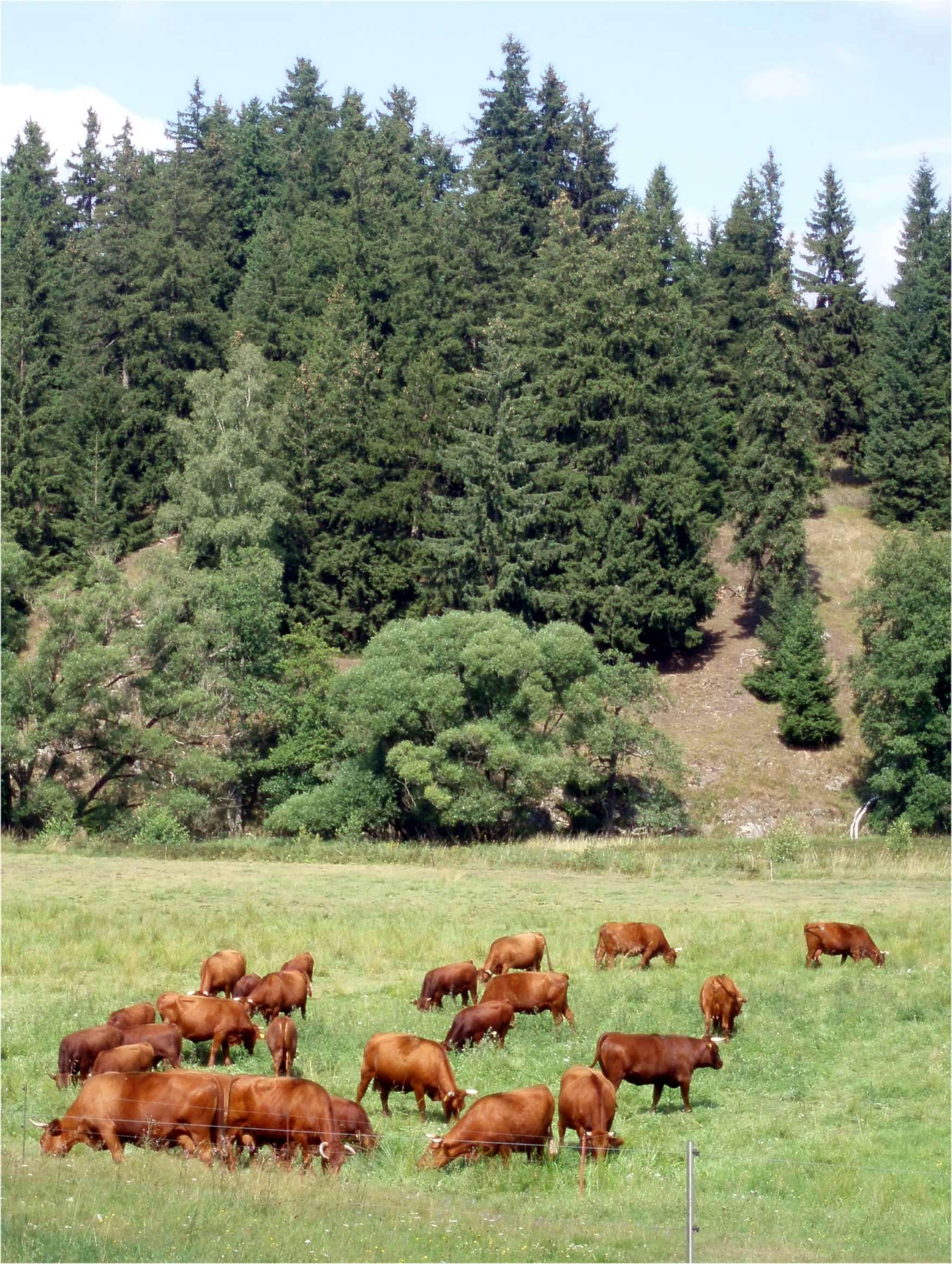 Harzkühe